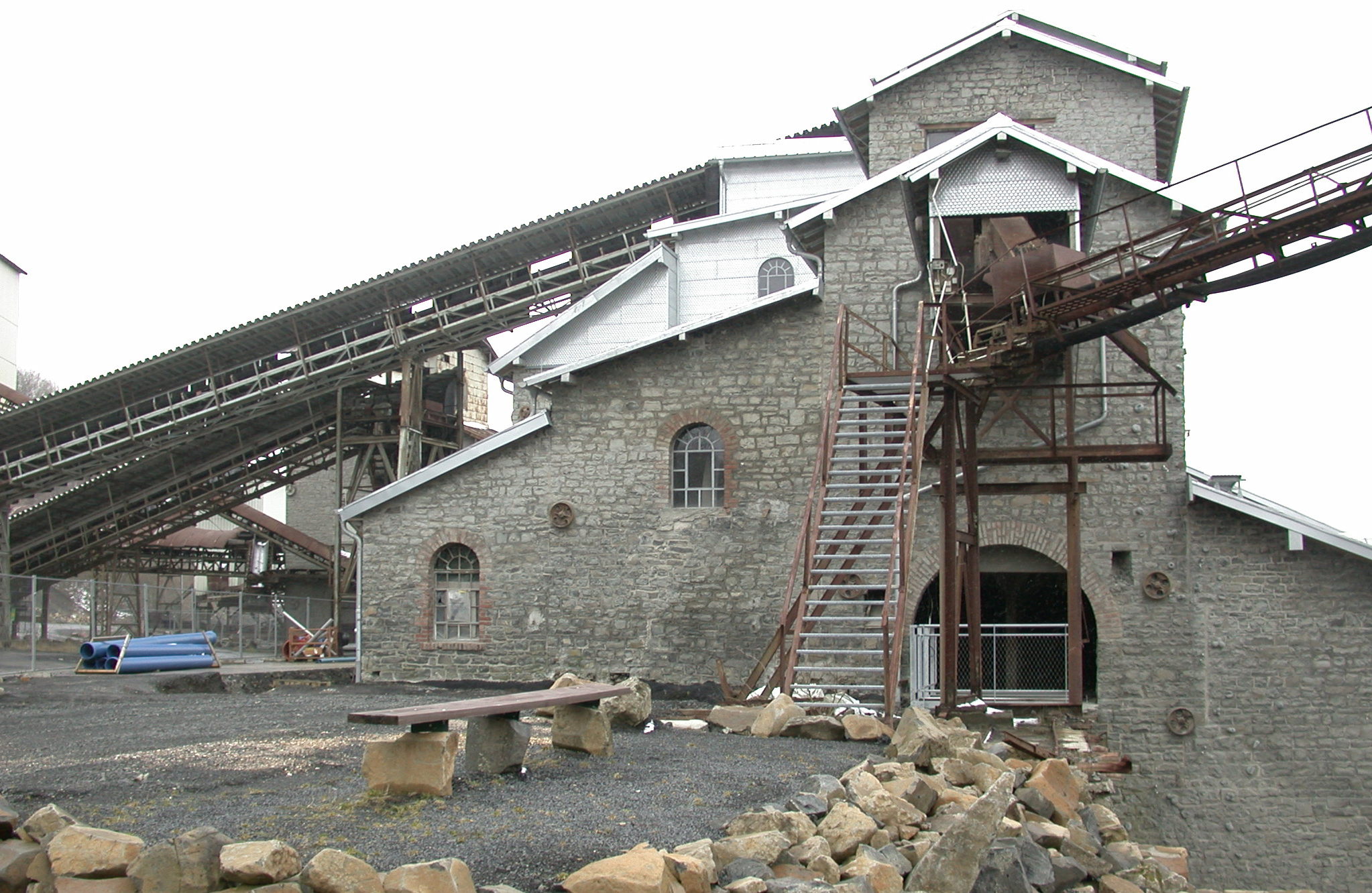 Tertiär- und Industrie-Erlebnispark Stöffel, Seitenansicht Hauptgebäude